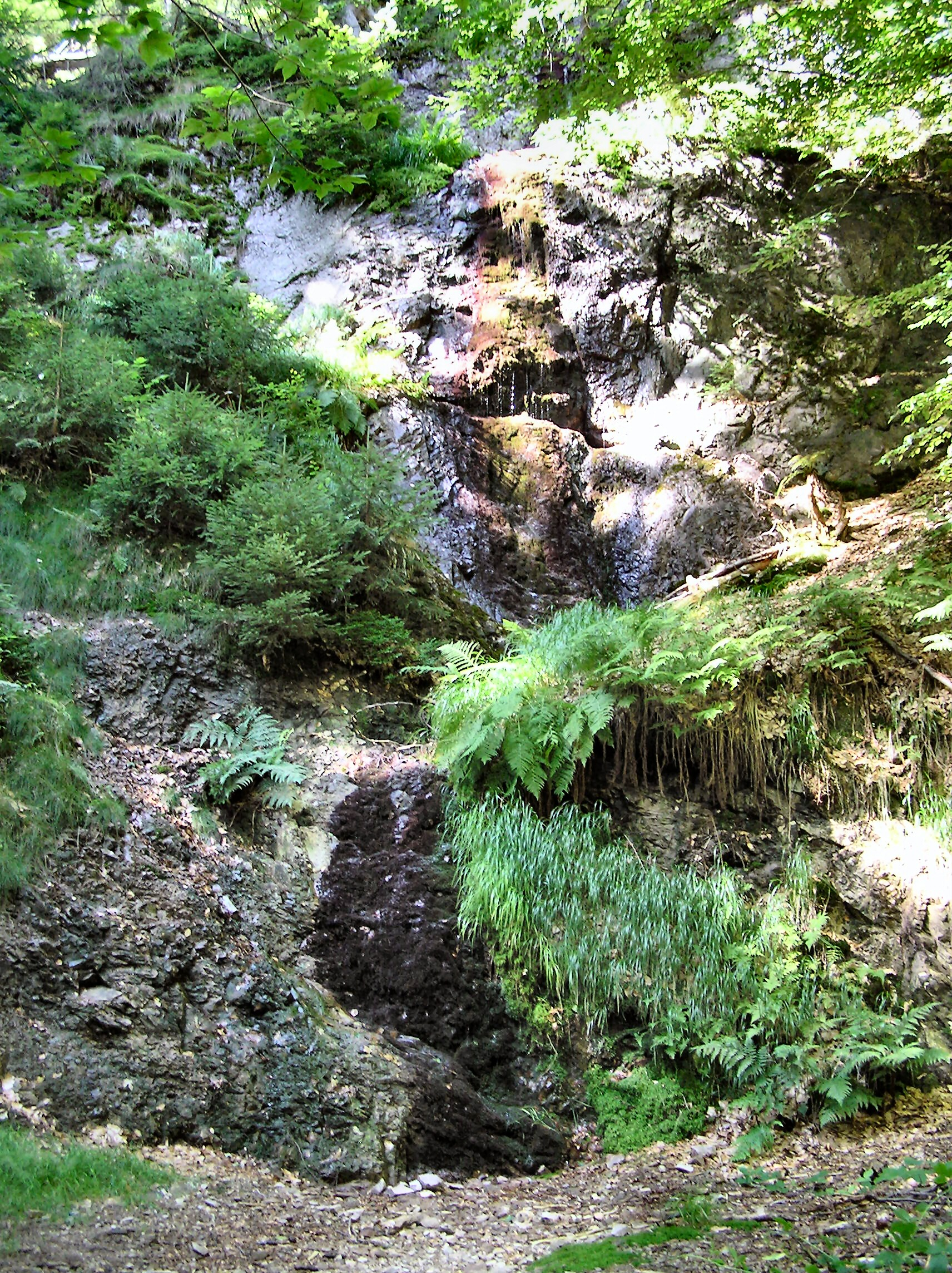 Wasserfall im Marktal